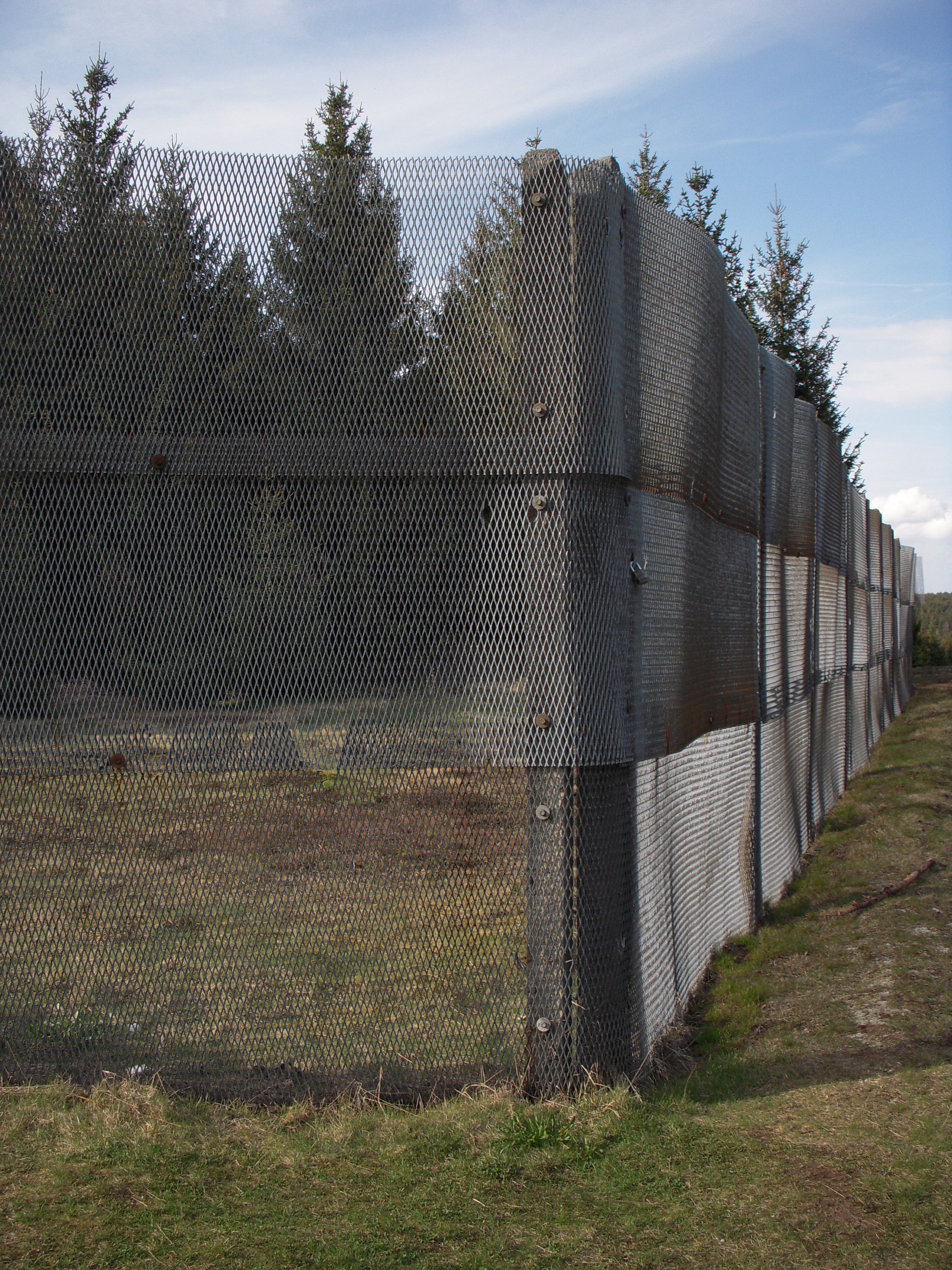 Sorge Dokumentationscenter: Hegn til den indre grænsezone, 27. april 2012